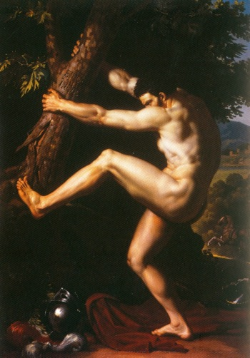 Roland furieux, Augustin Alphonse Gaudar de la Verdine. Huile sur toile, 1,94m x 2,75m, 1803-1804